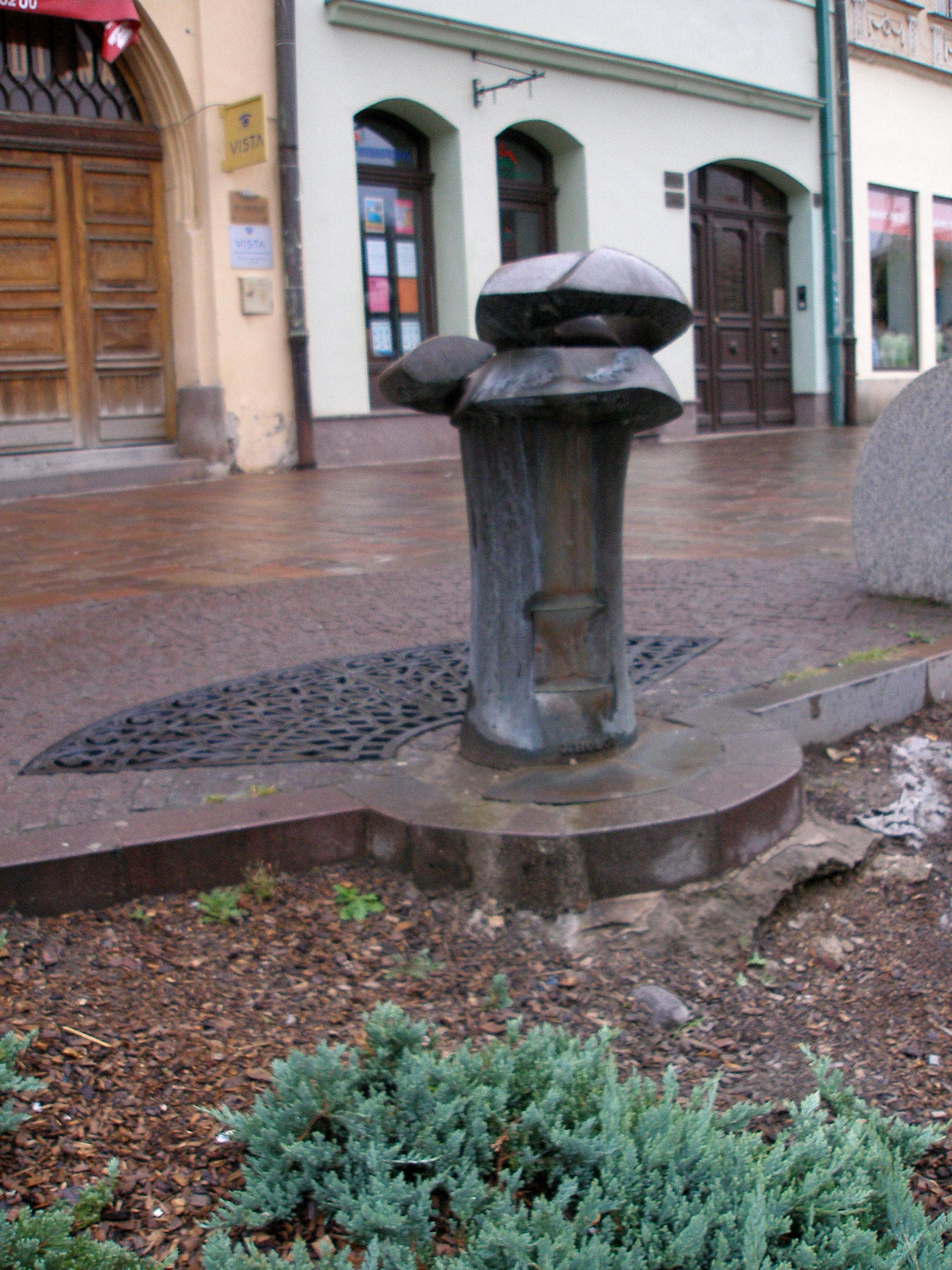 Fontána na pitnú vodu, jej pomenovanie je "Hríb" a nachádza sa na Hlavnej ulici pri Spolku svätého Vojtecha. Mesto Prešov región Šariš.